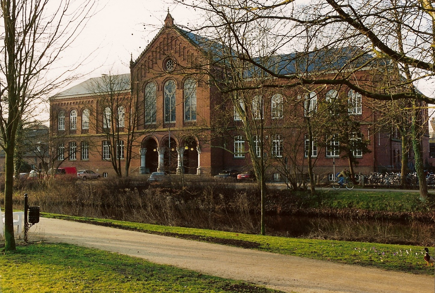 Altes Gymnasium zu Oldenburg